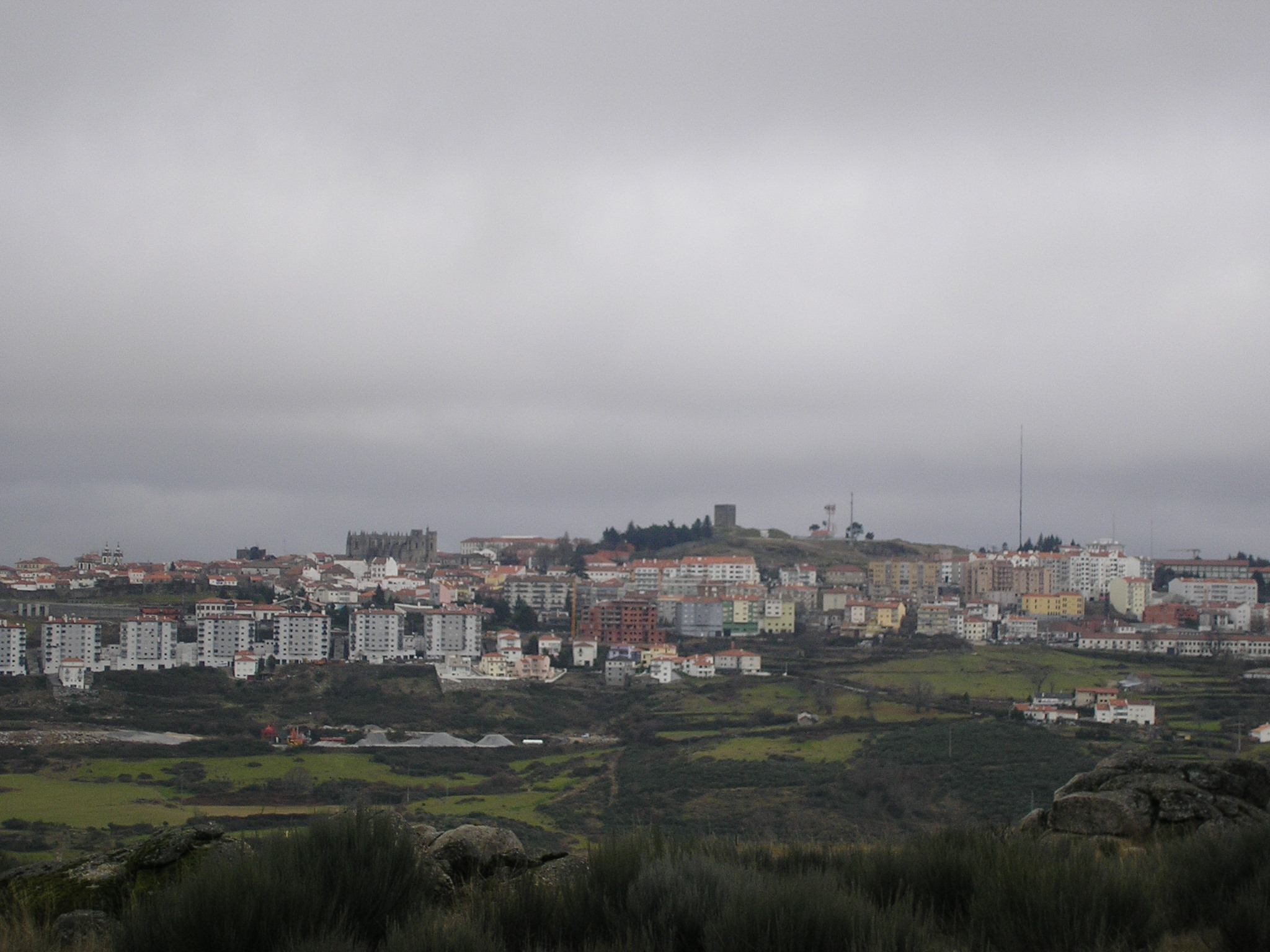 Ponto de referência da cidade mais alta de Portugal.